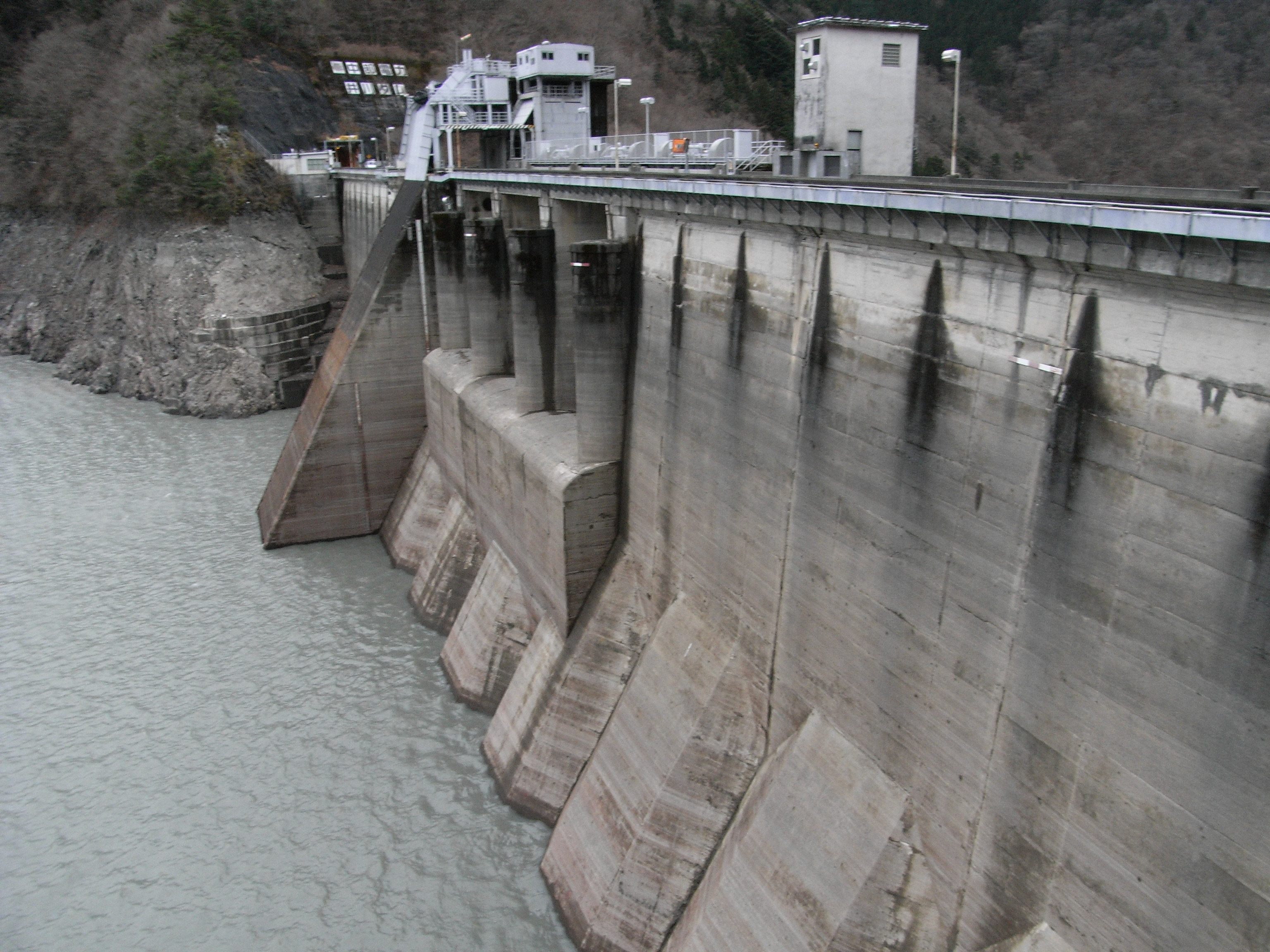 Dam